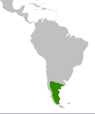 Habitat del Zaedyus pichiy - Piche patagónico.